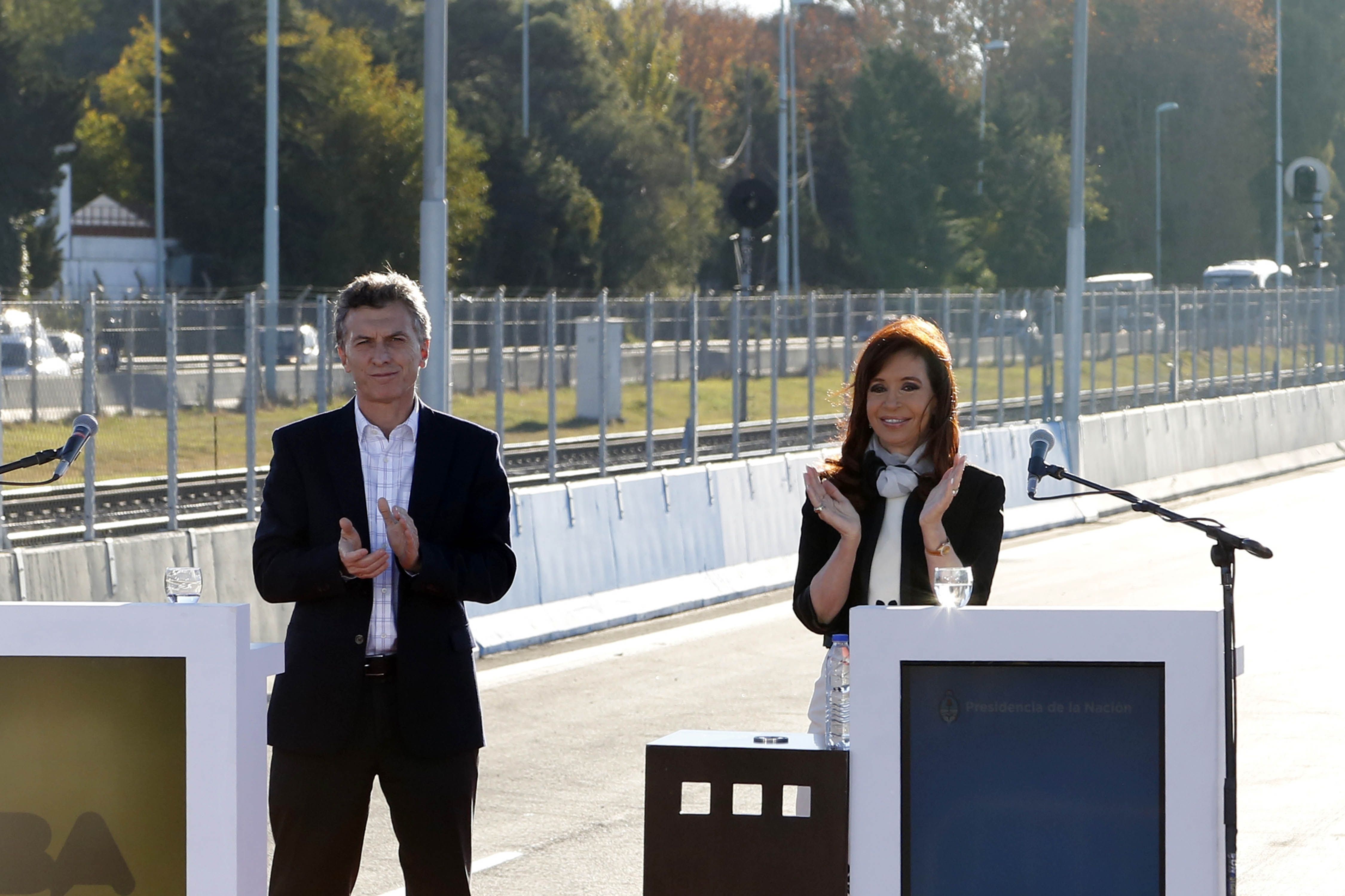 Inauguración de la Autopista Illia.